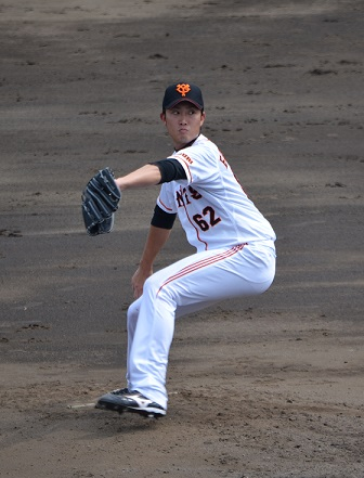 2013年7月28日の二軍戦での江柄子裕樹選手の様子です。